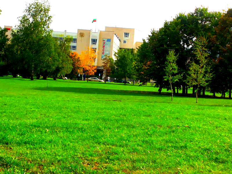 Парк "Студентски"